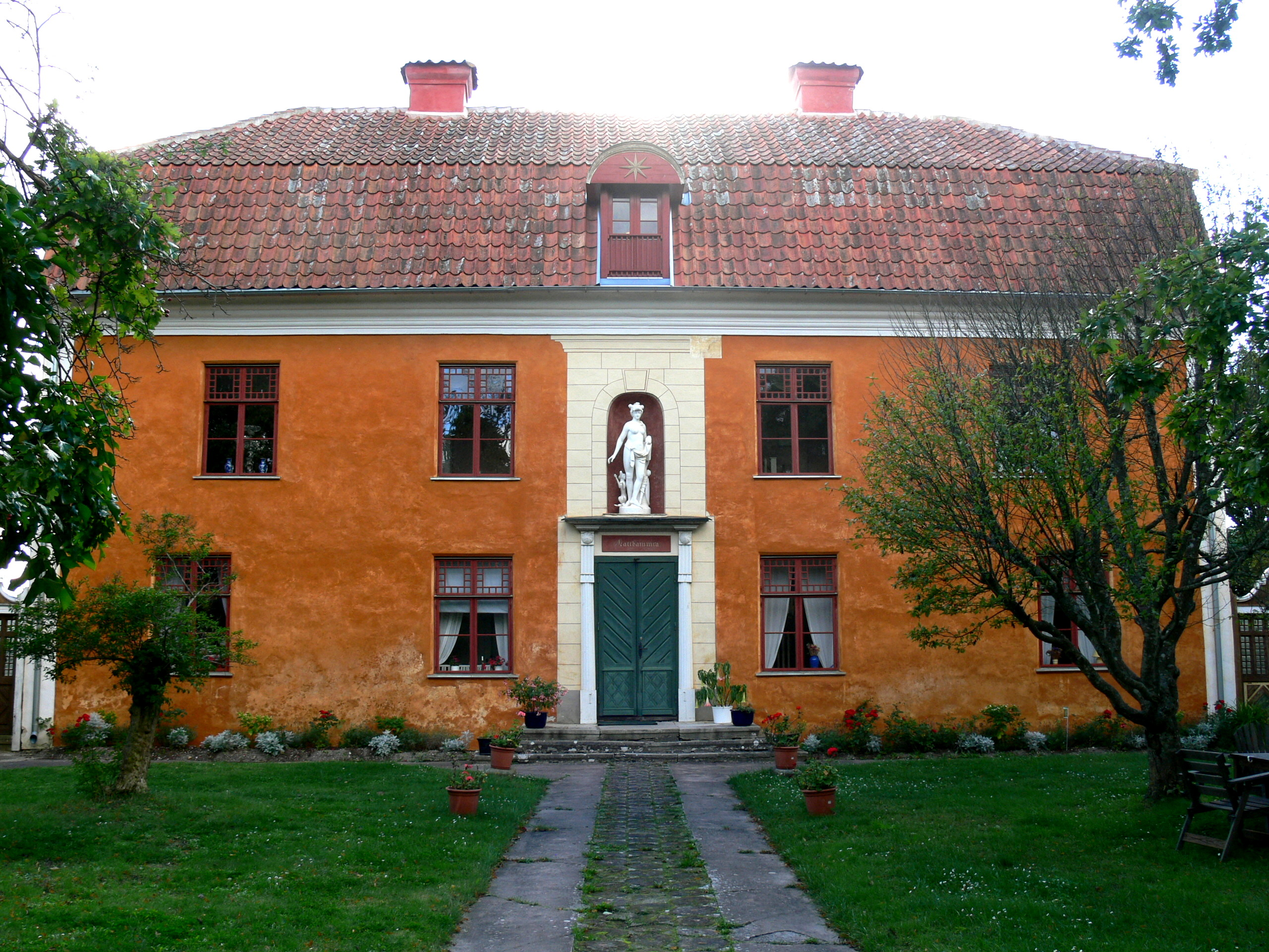 Katthamra Gard auf Gotland. Gutshof ( 18.Jhdt. ): Gutshaus